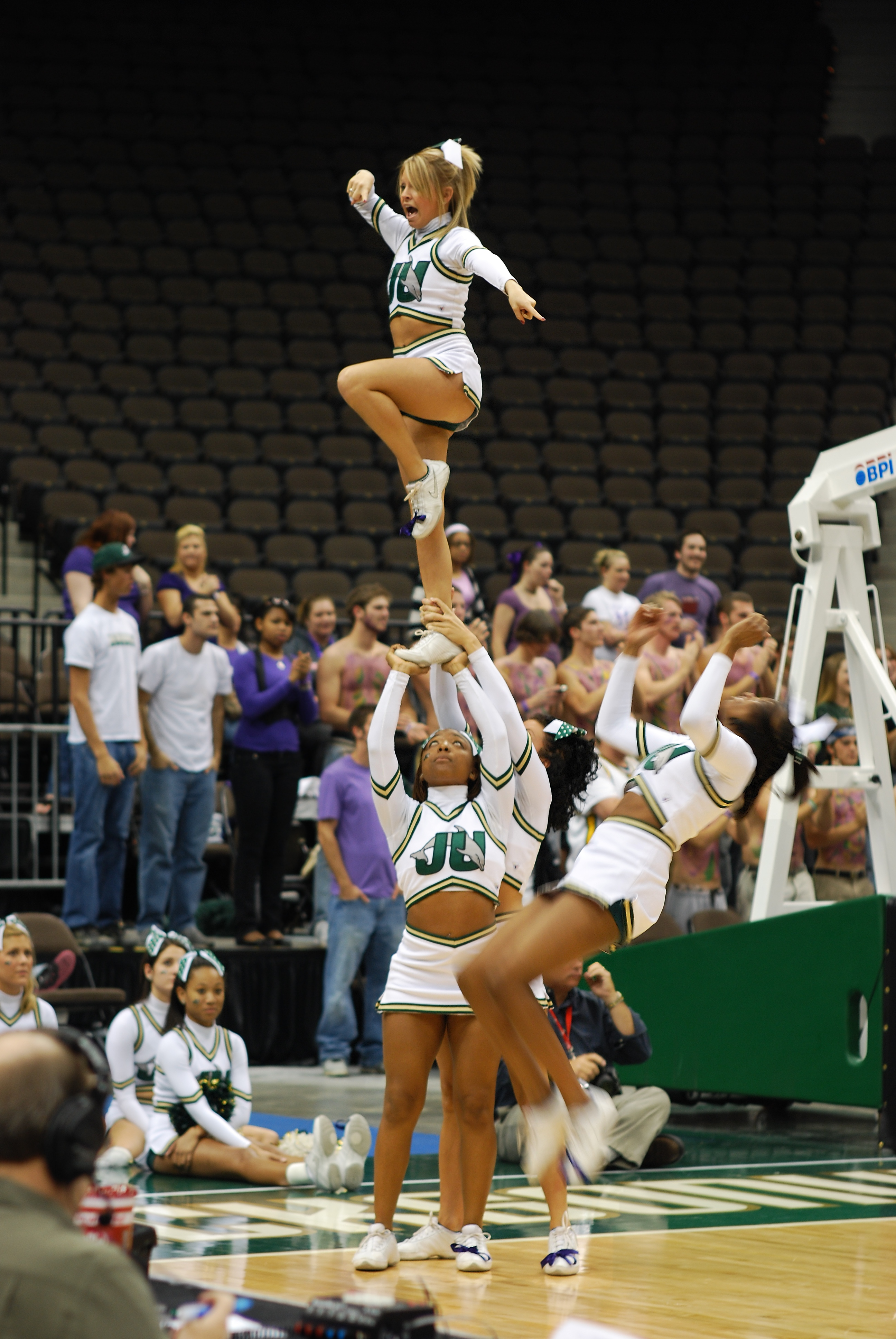 JU Cheerleaders. Jacksonville University vs Stetson University. Men's basketball. 23 february 2009. Jacksonville Arena. jacksonville. Florida. Nikon D60.